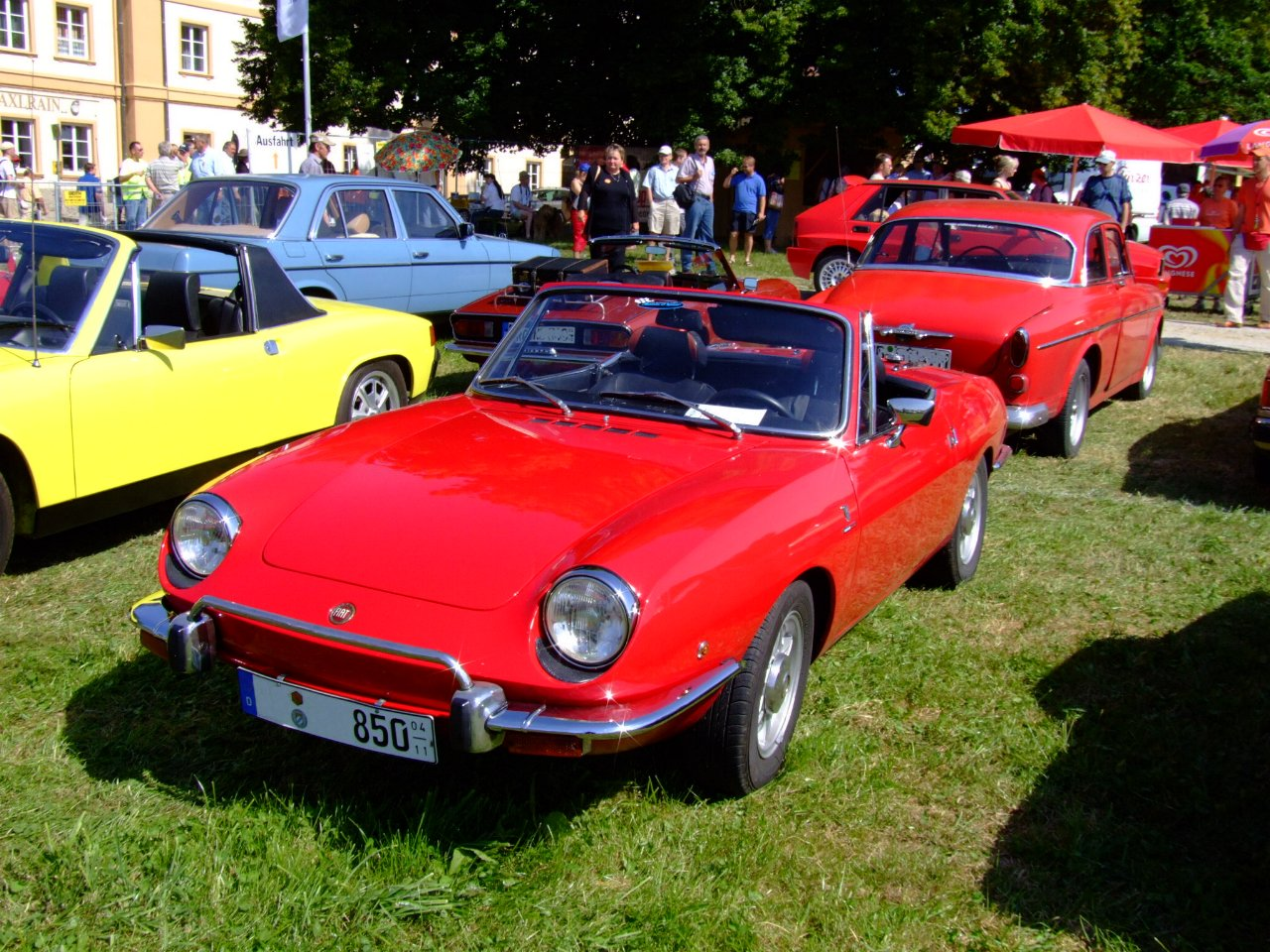 Fiat 850 Spider Baujahr: 1972 52 PS